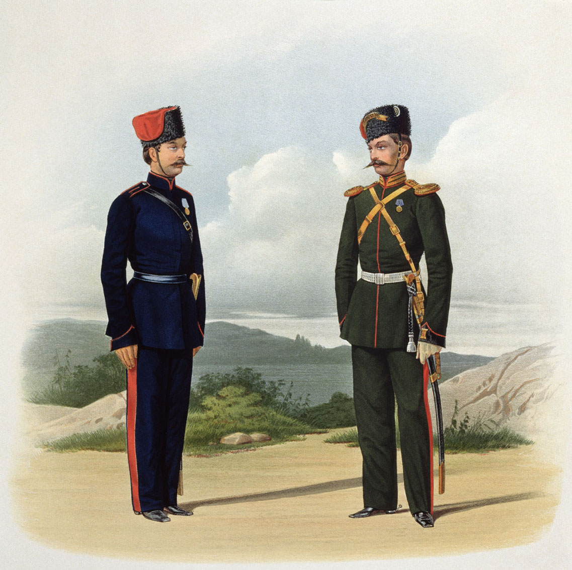 Казак Донского Войска и Обер-Офицер Донской Конно-Артиллерийской № 2 батареи, 30 мая 1862. (В городской парадной форме).